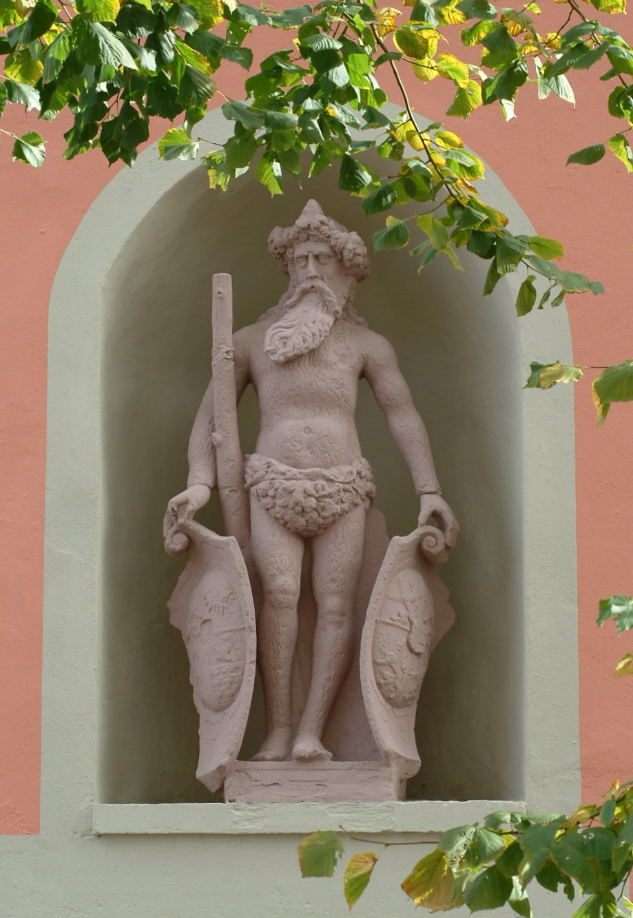 Wilder Mann in Sulzburg